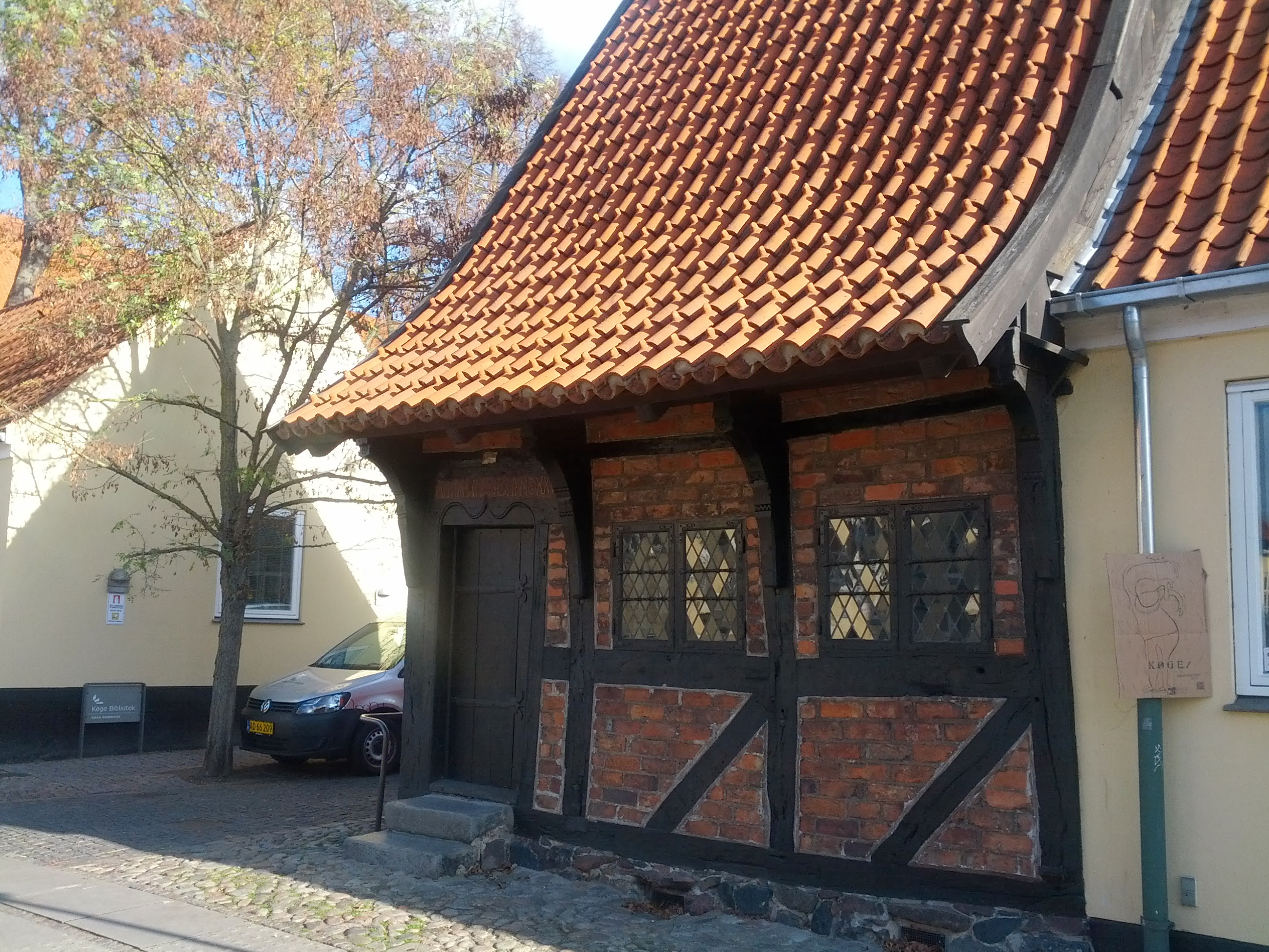 Huset ligger i Kirkestræde 20, Køge og havde oprindeligt et lige så gammelt nabohus, nr. 22. Dette er nedrevet 1908.